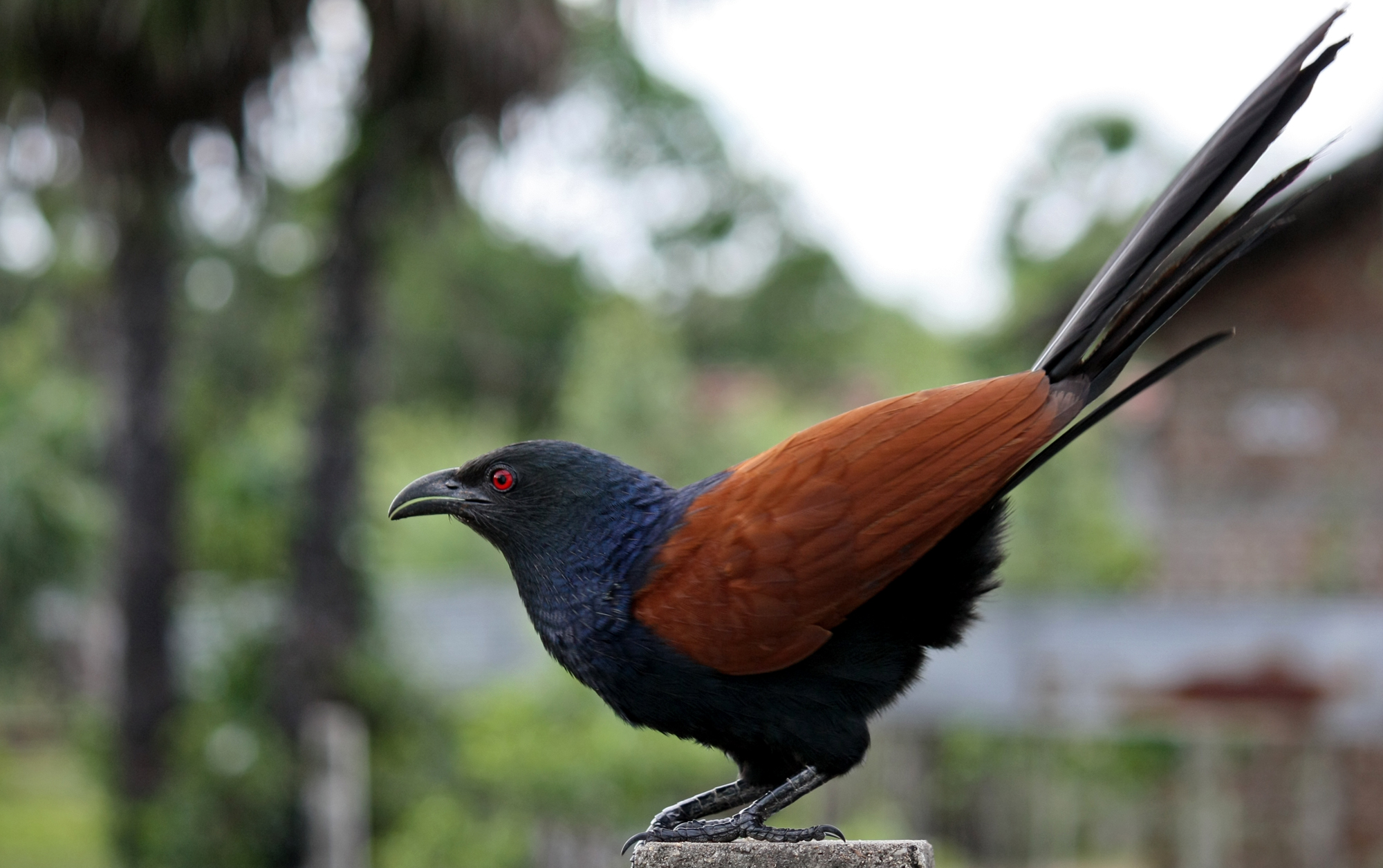 செண்பகம் - தமிழ்நாட்டில்/இலங்கையில் காணப்படும் பறவைகள்